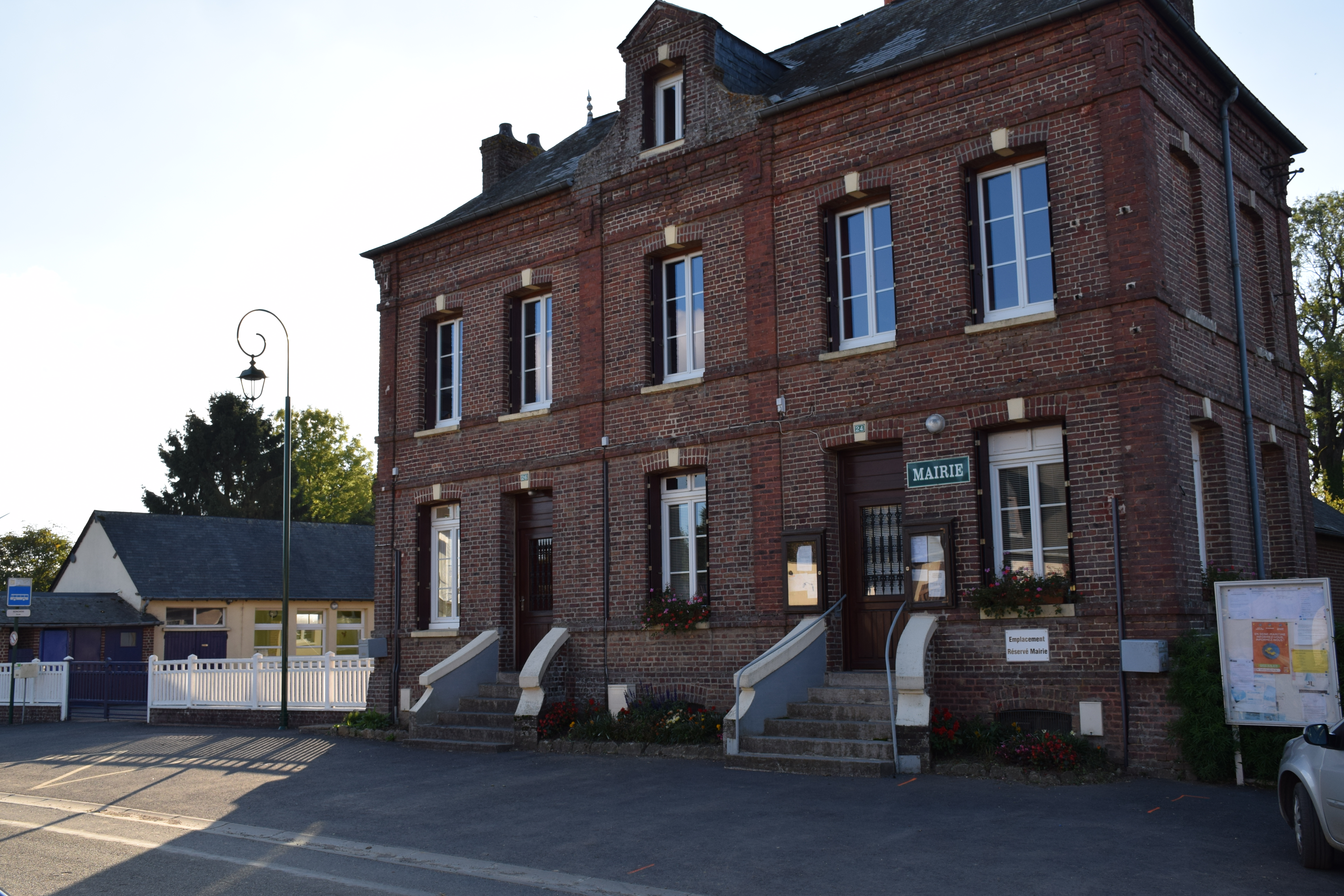 Mairie